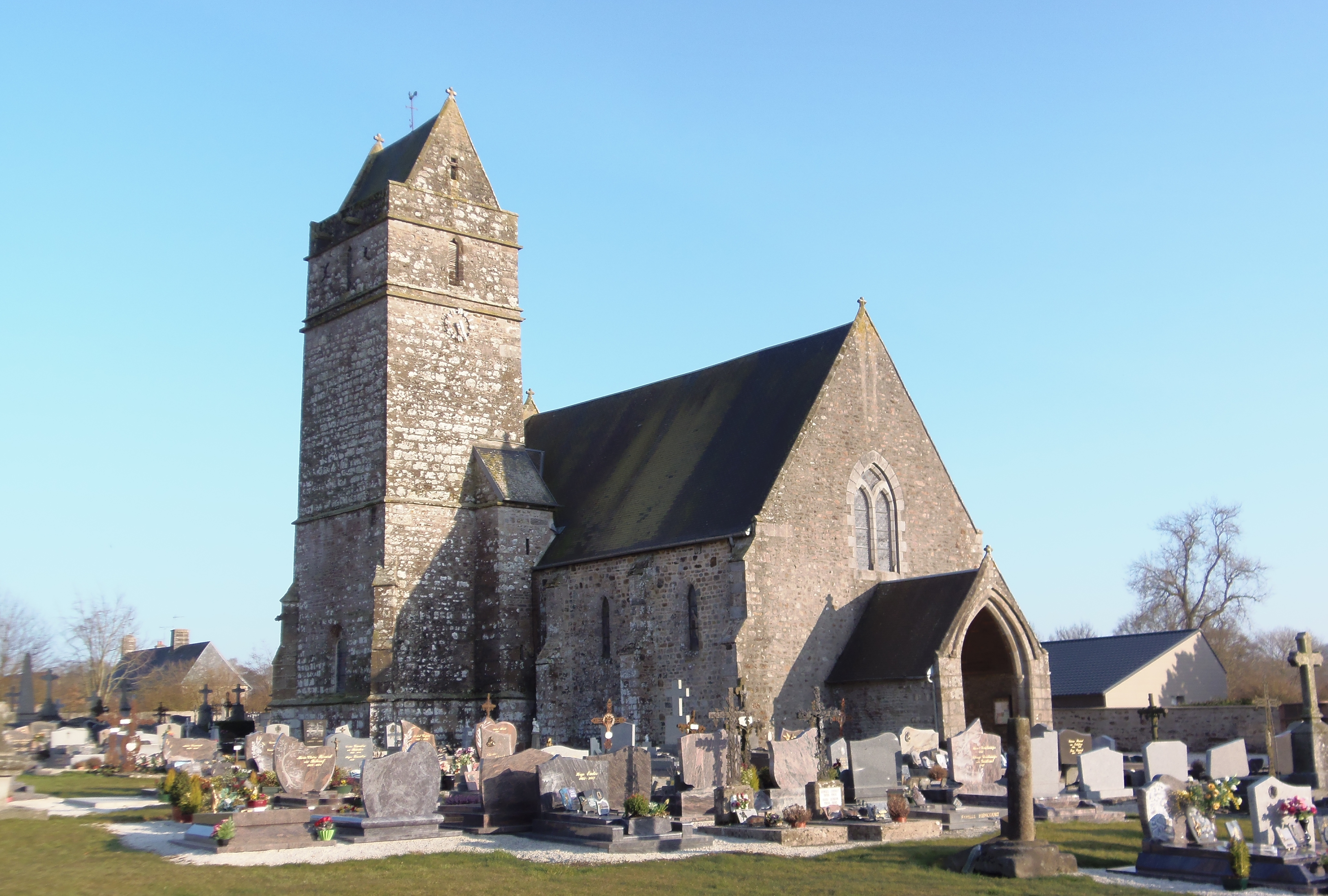 La Colombe (Normandie, France). L'église Notre-Dame.